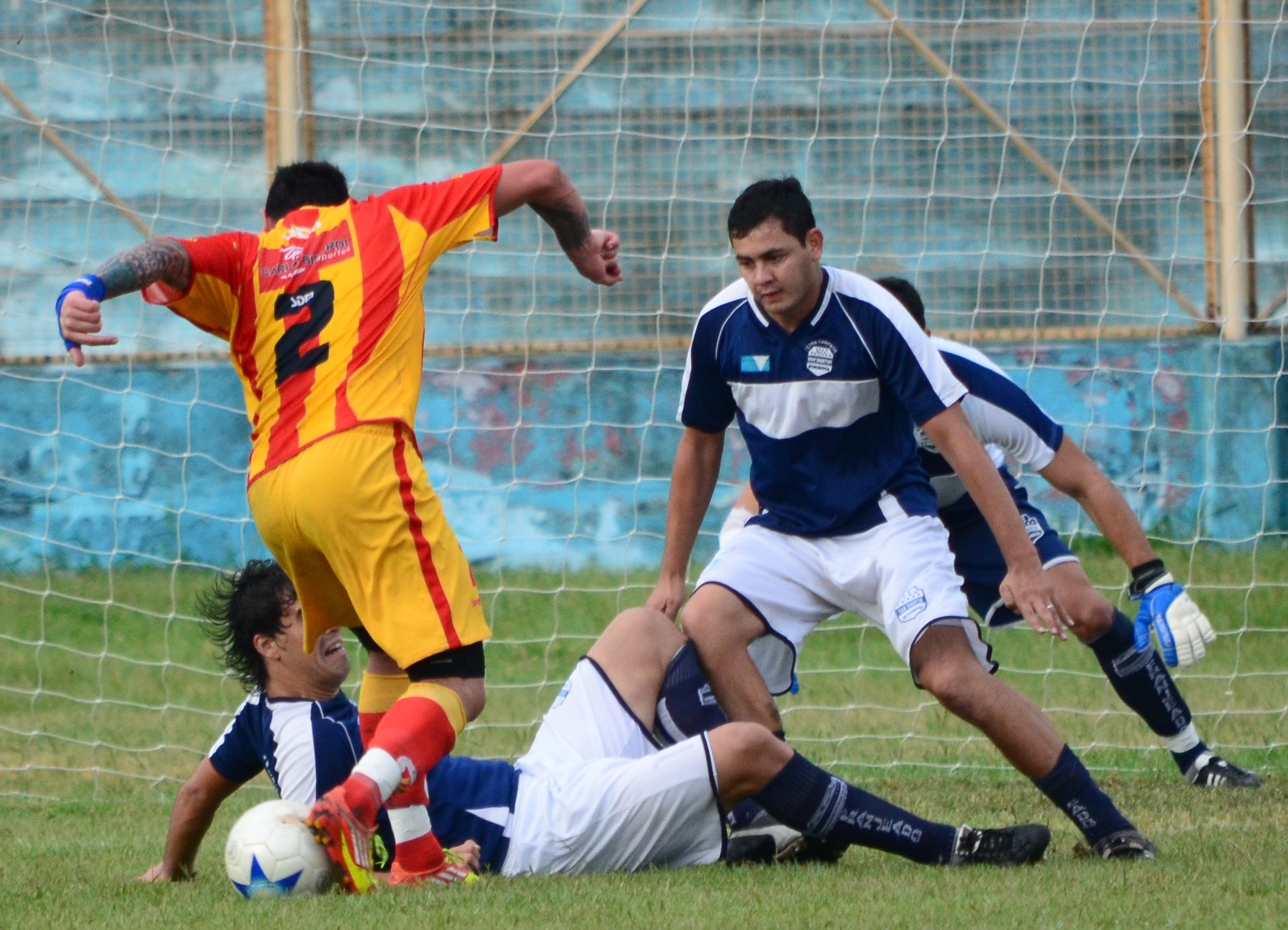 Paulo Centurión pisando el area rival en unas de las tantas llegadas que tuvieron los aurirojos en partido disputado entre chaqueños y formoseños en el Estadio Antonio Romero de la Provincia de Formosa